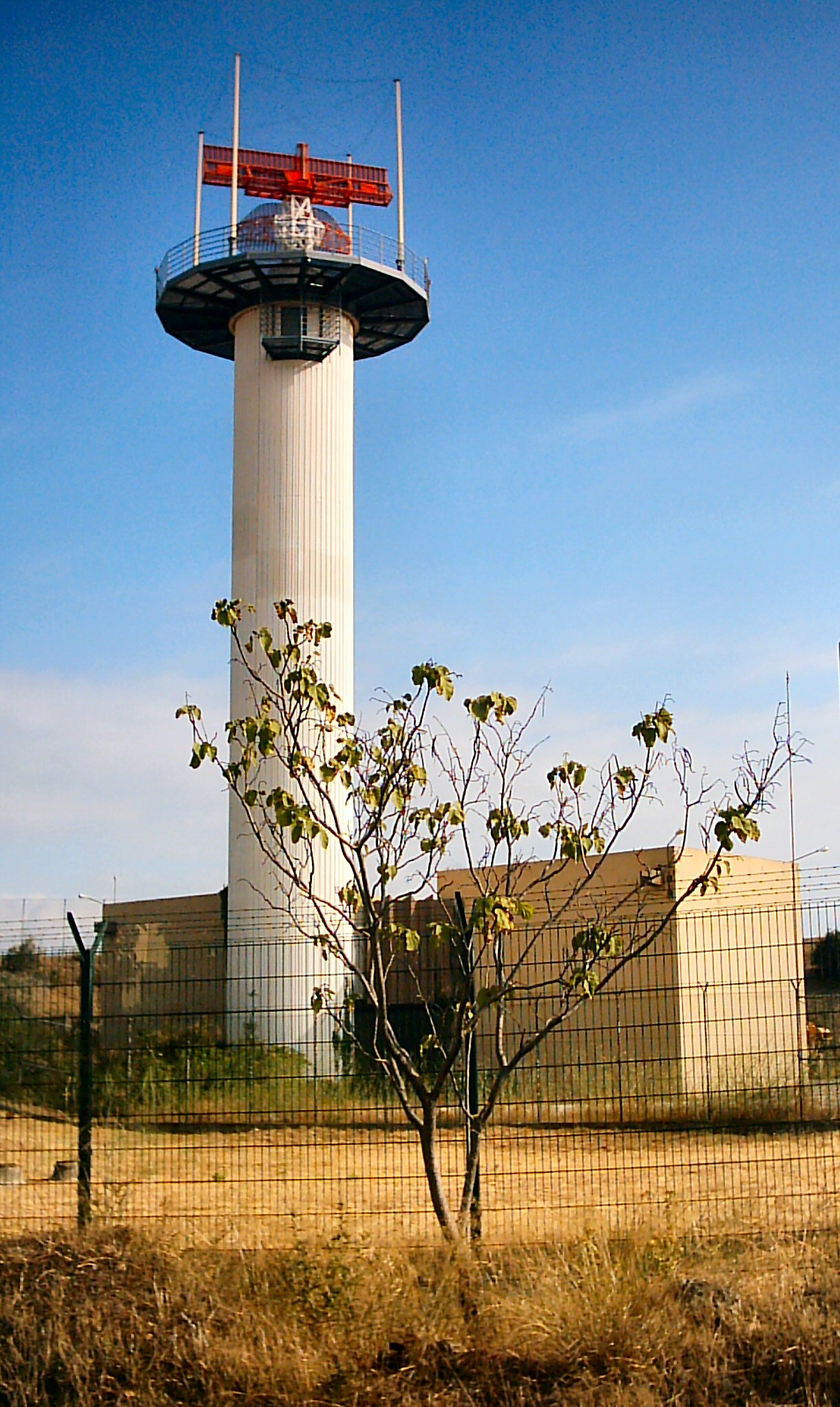 Torre do radar do Aeroporto de Lisboa, Lisboa, Portugal